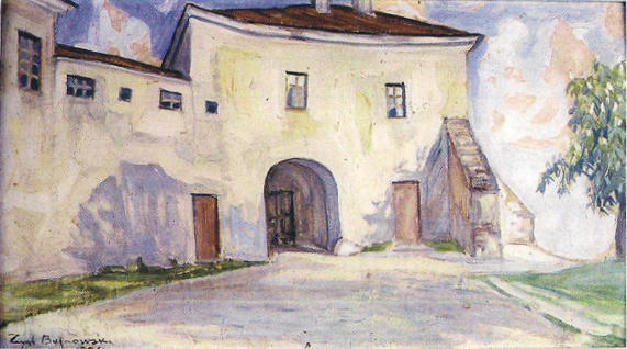 Замак Стэфана Баторыя; папера, наклееная на картон, алей; 21х49